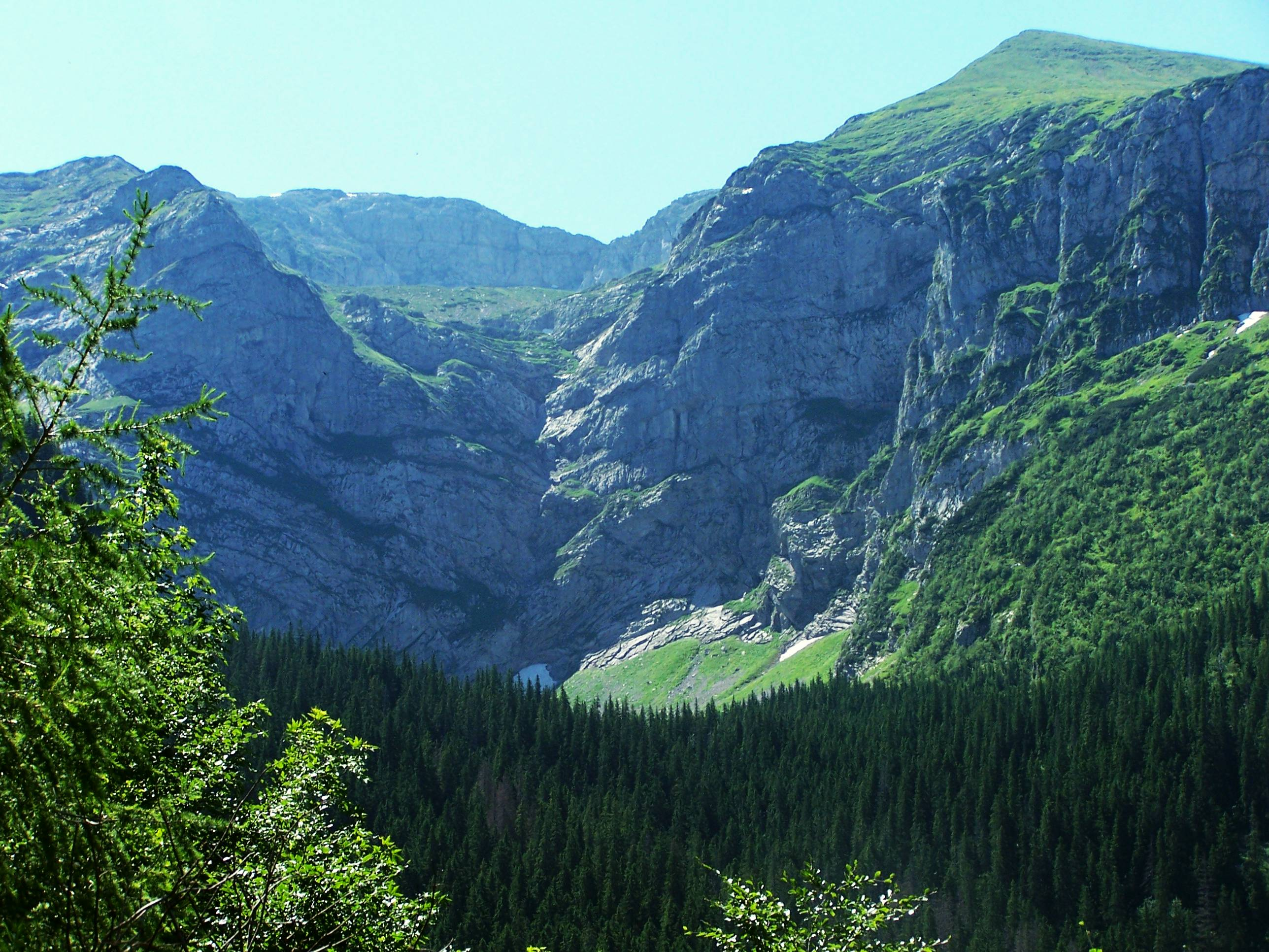 Wielka Świstówka (Tatra Mountains - Dolina Miętusia)